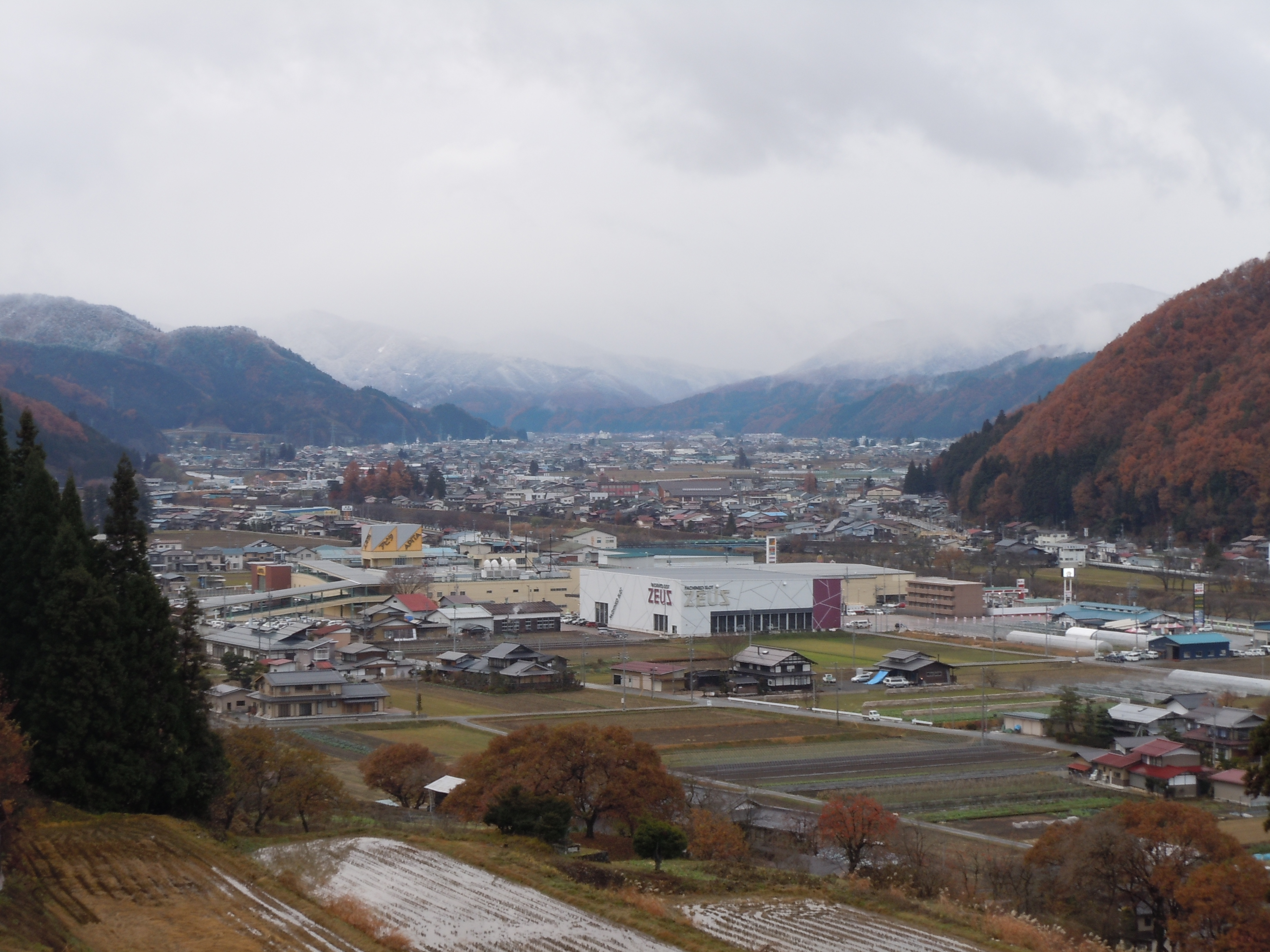 古川・国府盆地 岐阜県高山市国府町方面から飛騨市古川町方面を望む